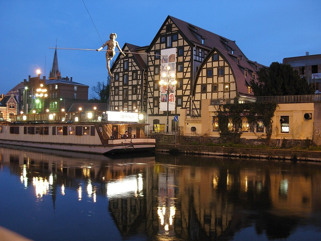 Spichrze w Bydgoszczy - wieczór